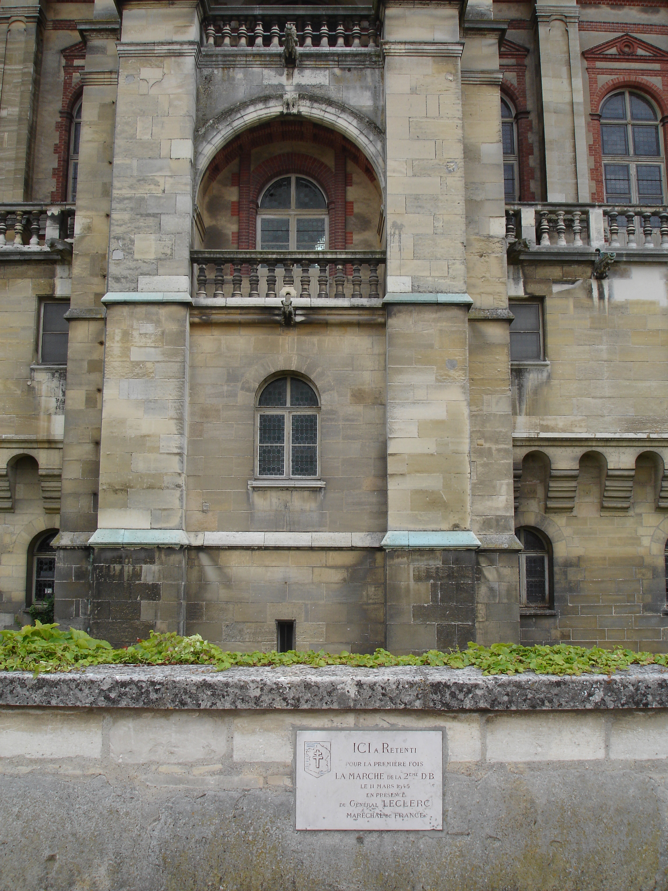 Château de Saint-Germain-en-Laye (France) plaque commémorative de la création de la Marche de la 2e DB en présence du Général Leclerc le 11 mars 1945